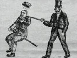 풍자만화, 일제 강점기 후반 일본 관헌들에게 지팡이를 휘두른 박중양